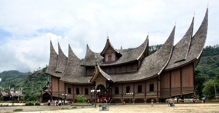 Pagaruyung Istana